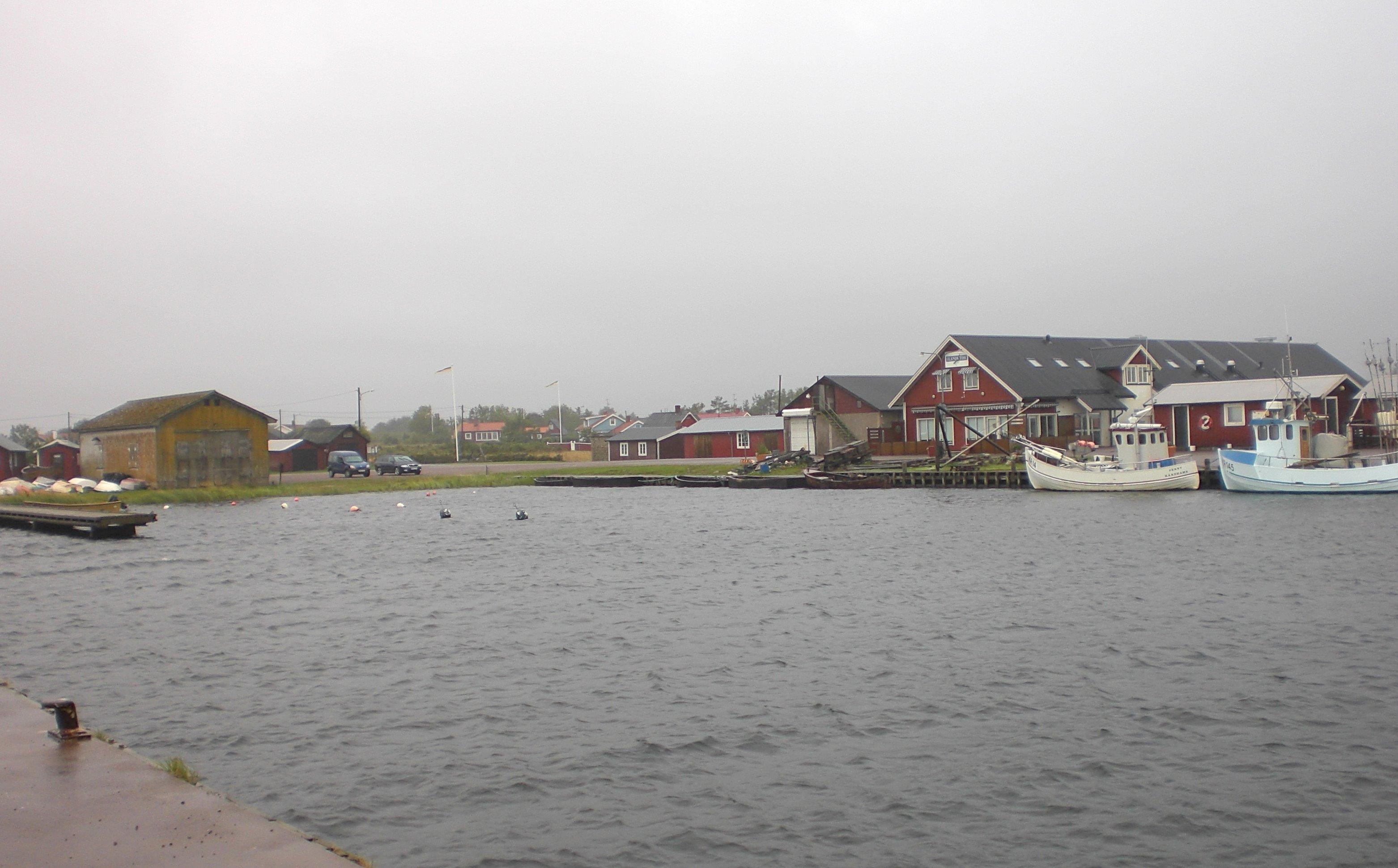 Blick auf den Hafen von Karehamn auf Öland, Schweden